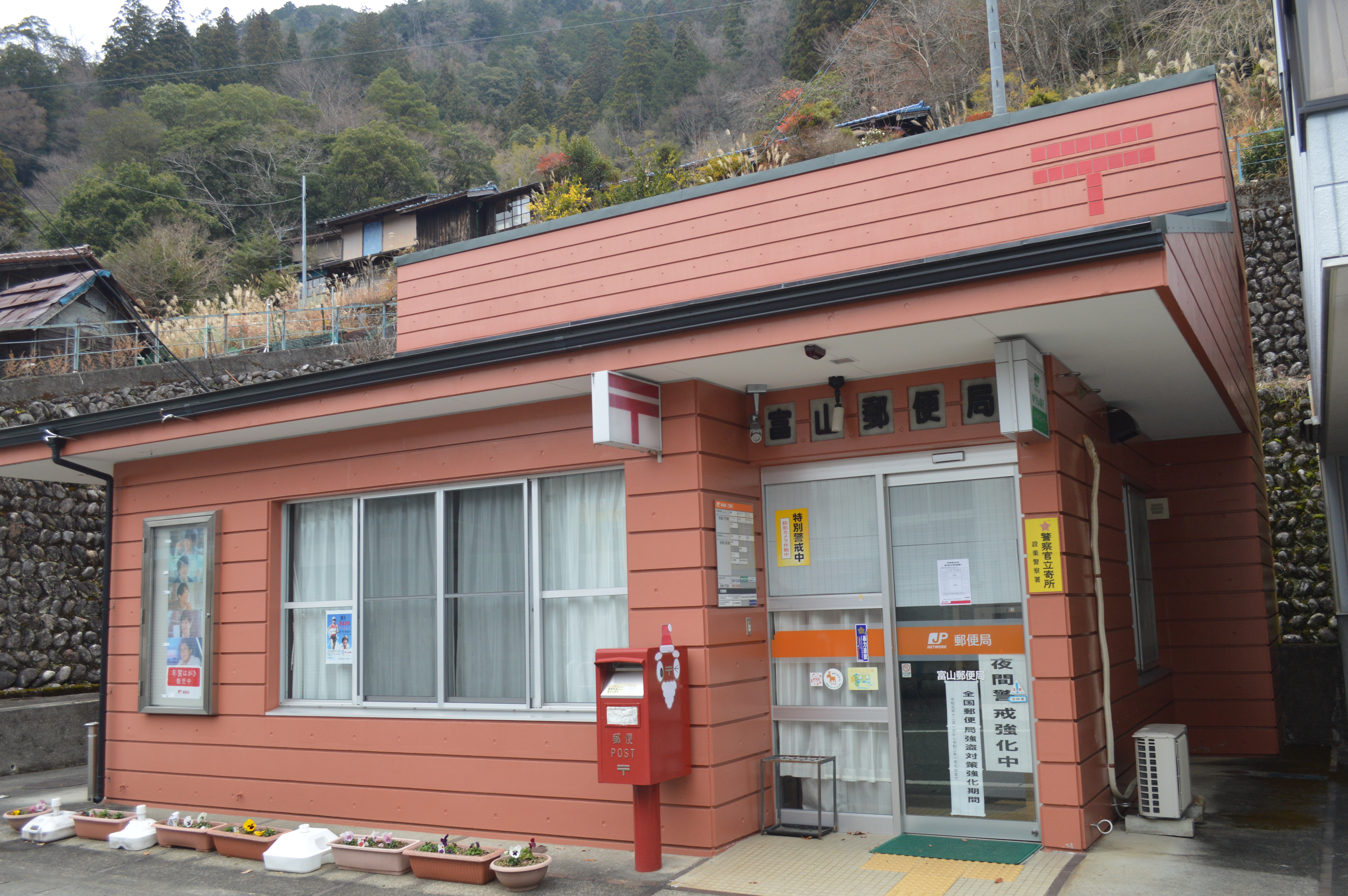 愛知県北設楽郡豊根村富山にある富山郵便局。